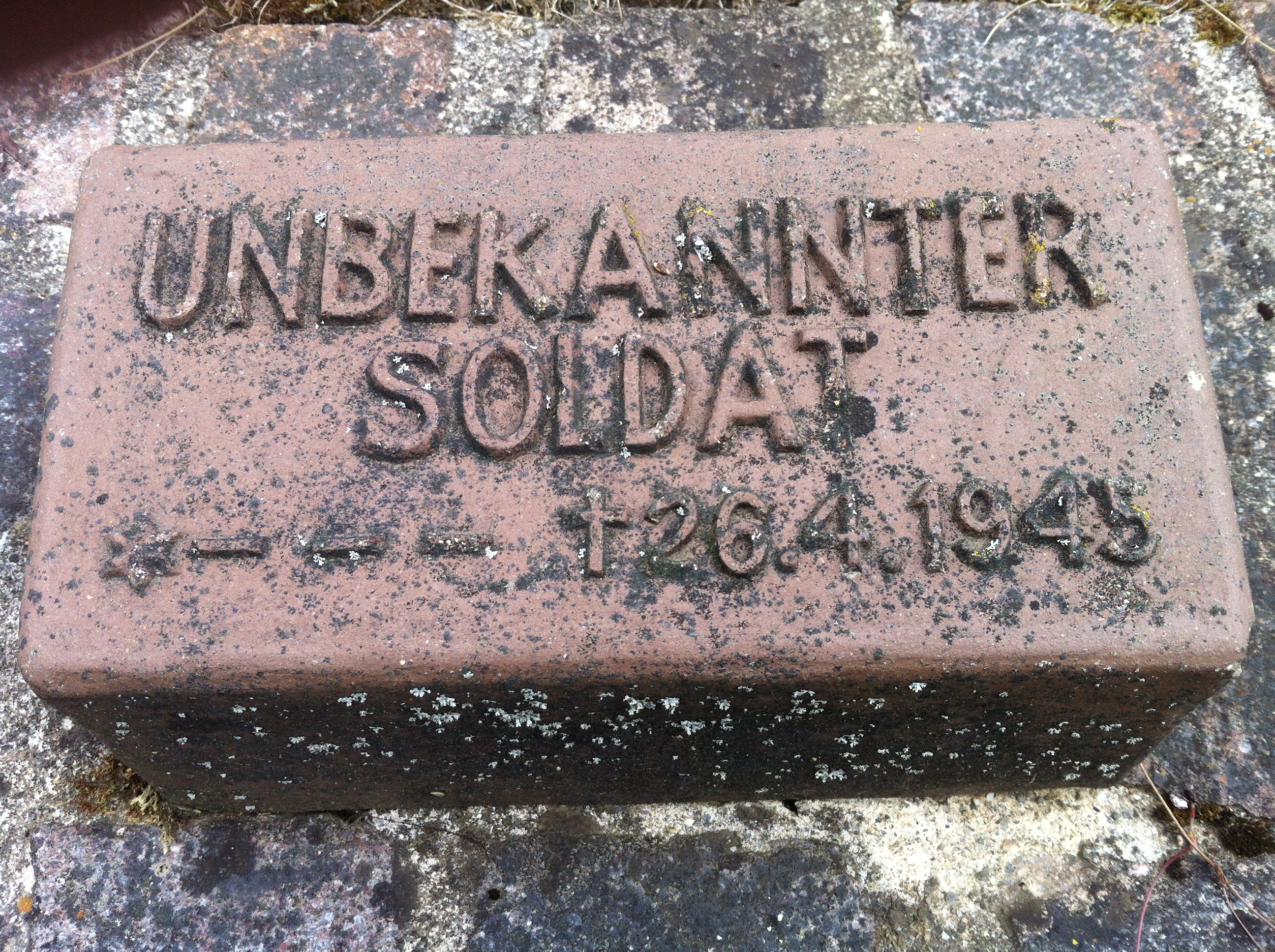 Blumberg, Stadt im Schwarzwald-Baar-Kreis. Grabplatte eines unbekannten deutschen Soldaten. Gefallen bei Kämpfen im Raum Blumberg am 26. April 1945. Friedhof bei der Evangelischen Kirche.